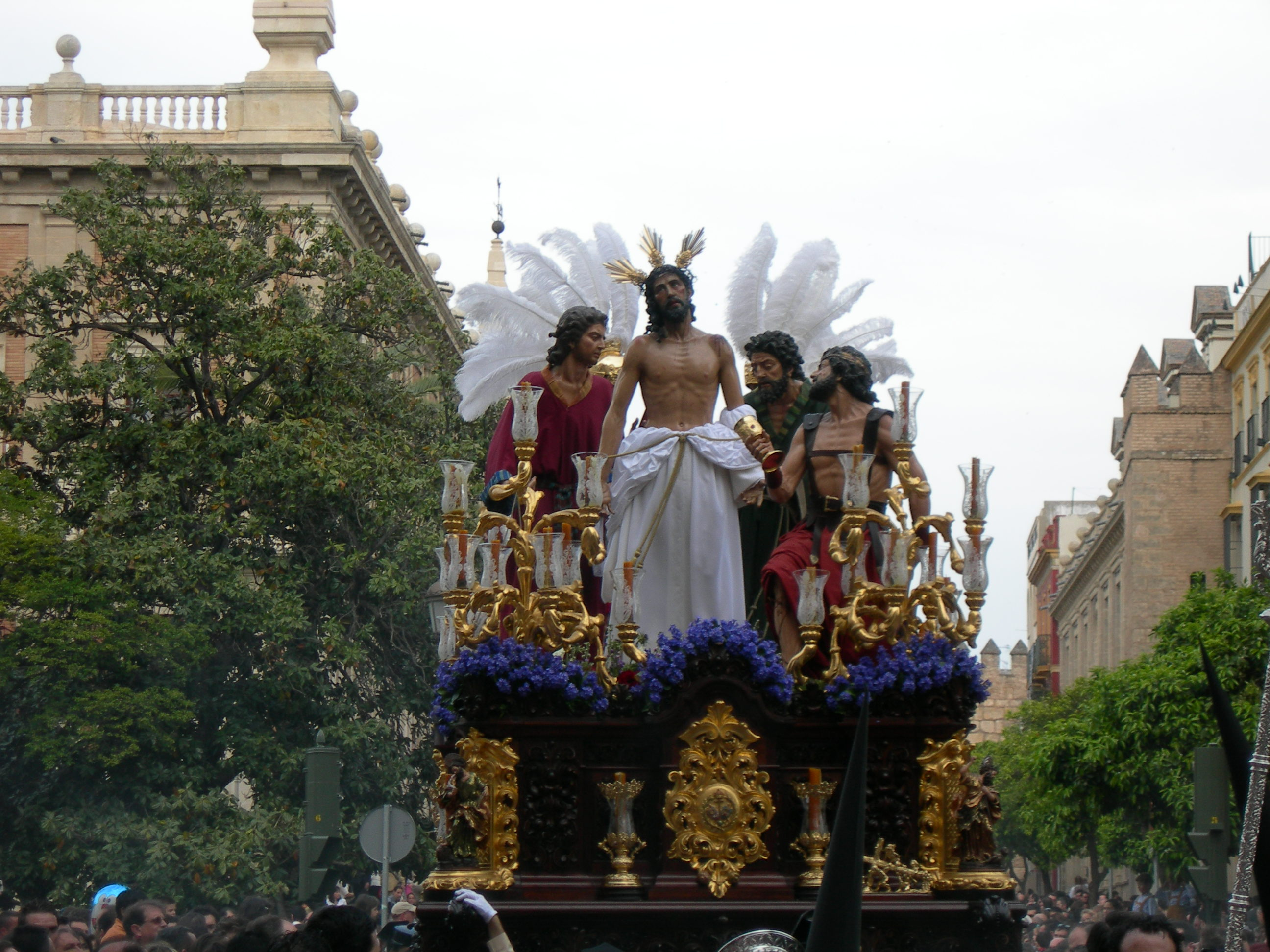 Paso de Nuestro Padre Jesús despojado de sus vestiduras. Domingo 9 de abril de 2006